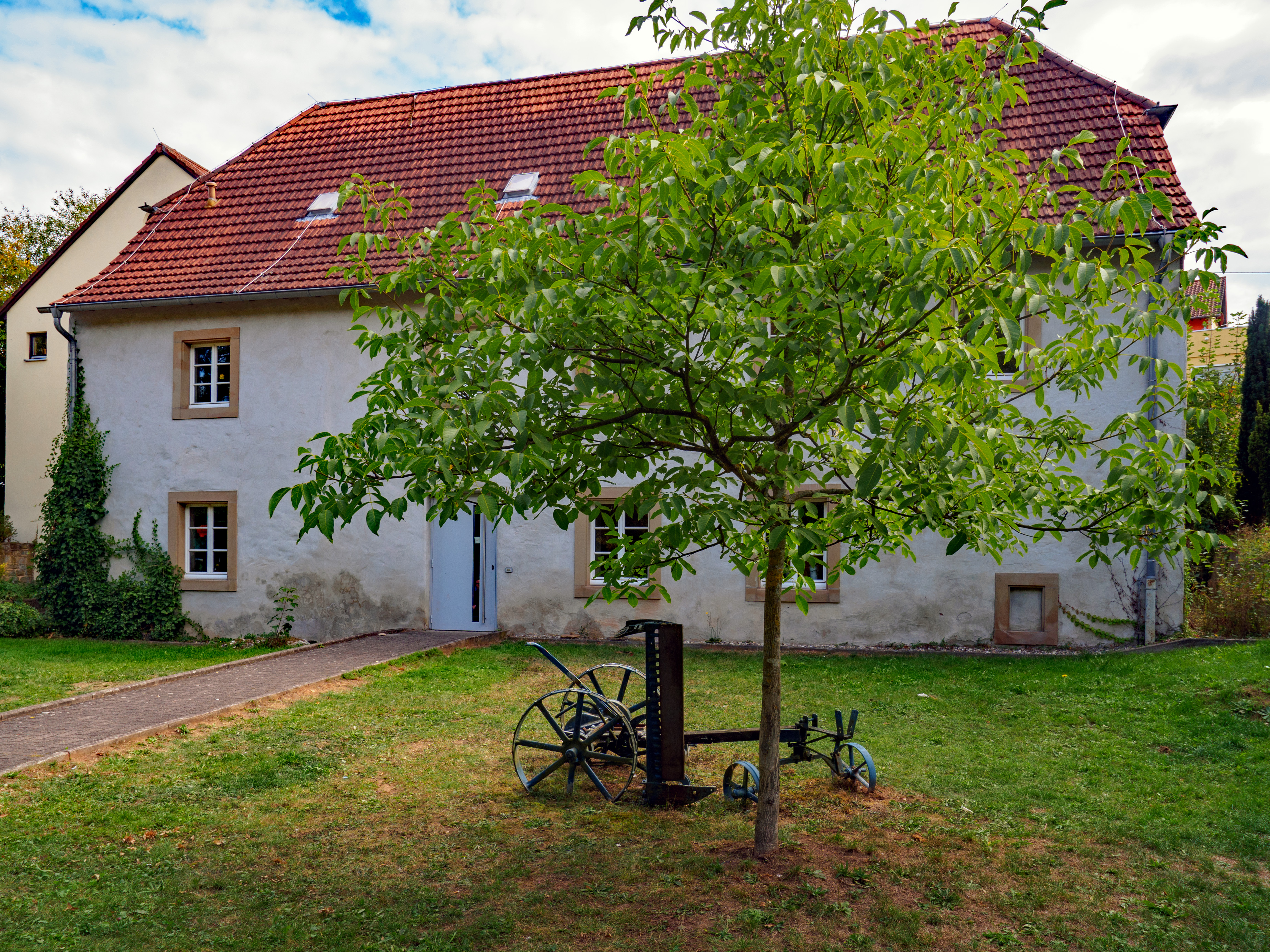 Alte Mühle in Marpingen, Schafbrücke 7